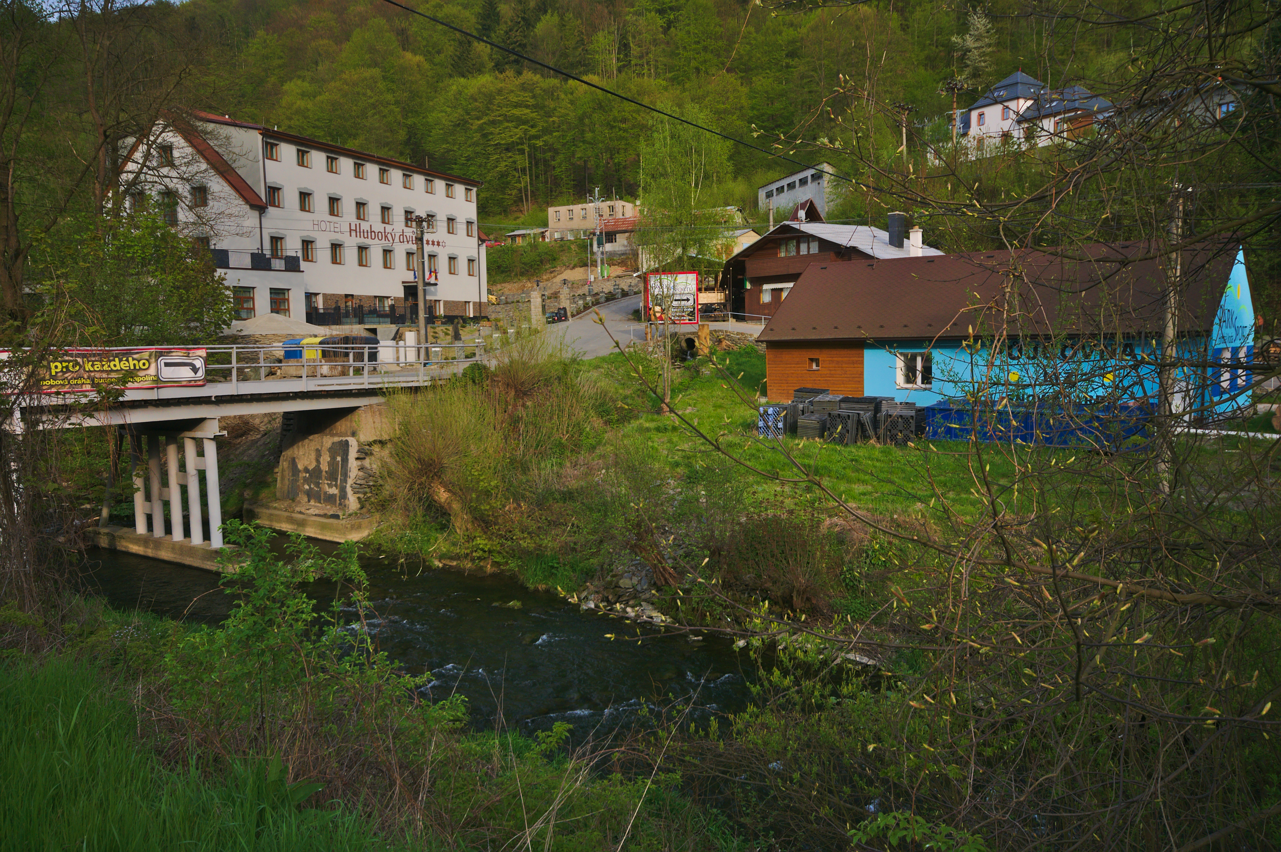 Hotely, Hrubá Voda, Hlubočky, okres Olomouc